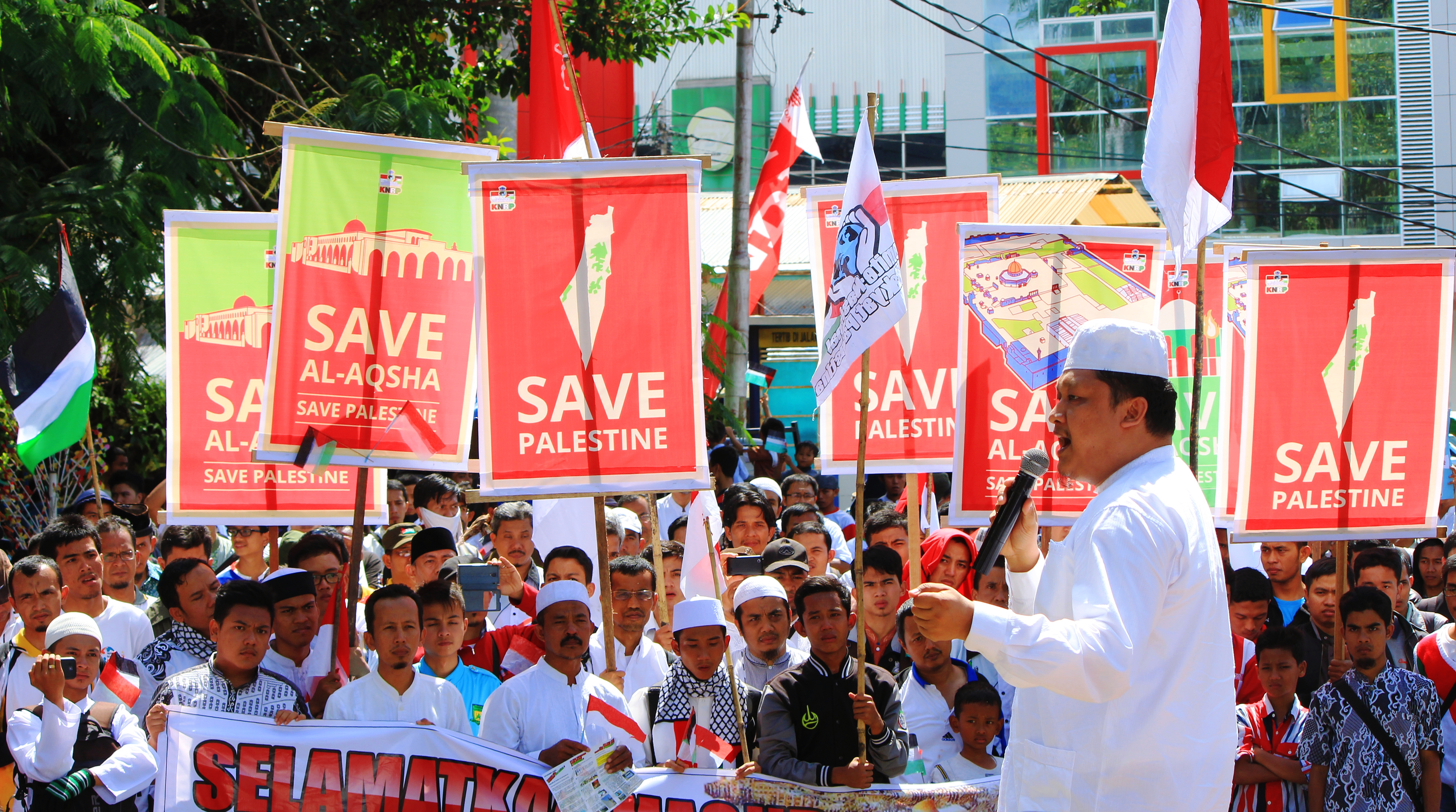 Orasi Dr. Urwatul Wutsqo